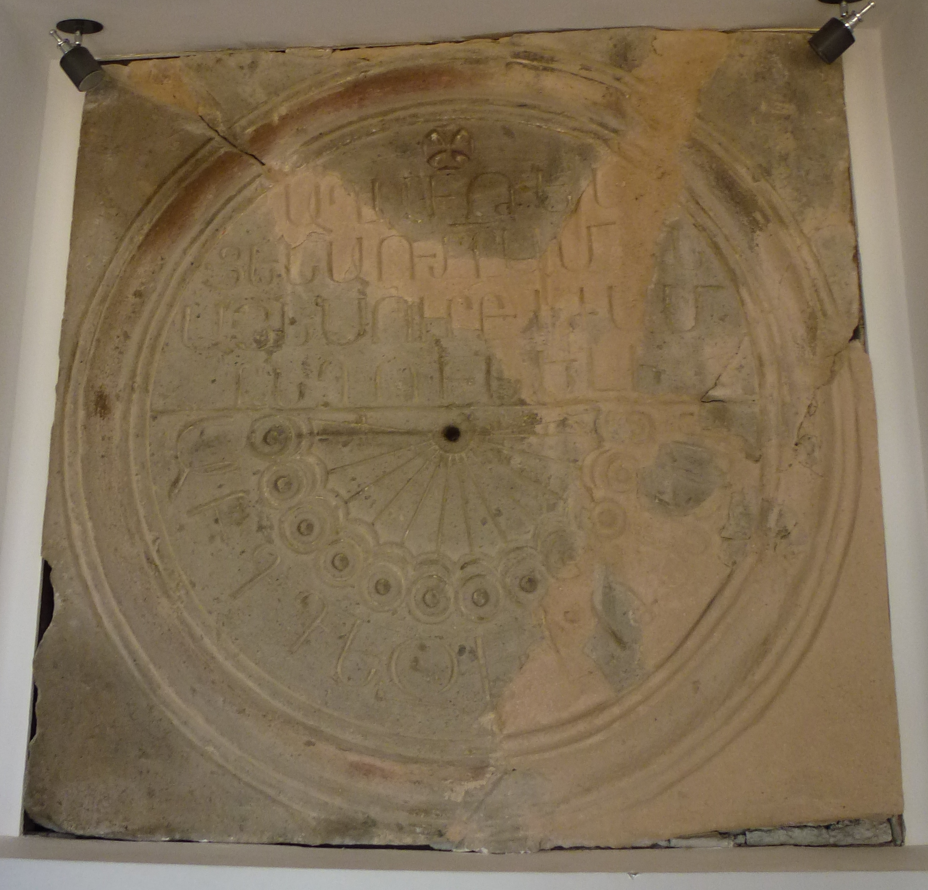 Զվարթնոց տաճար 2/13